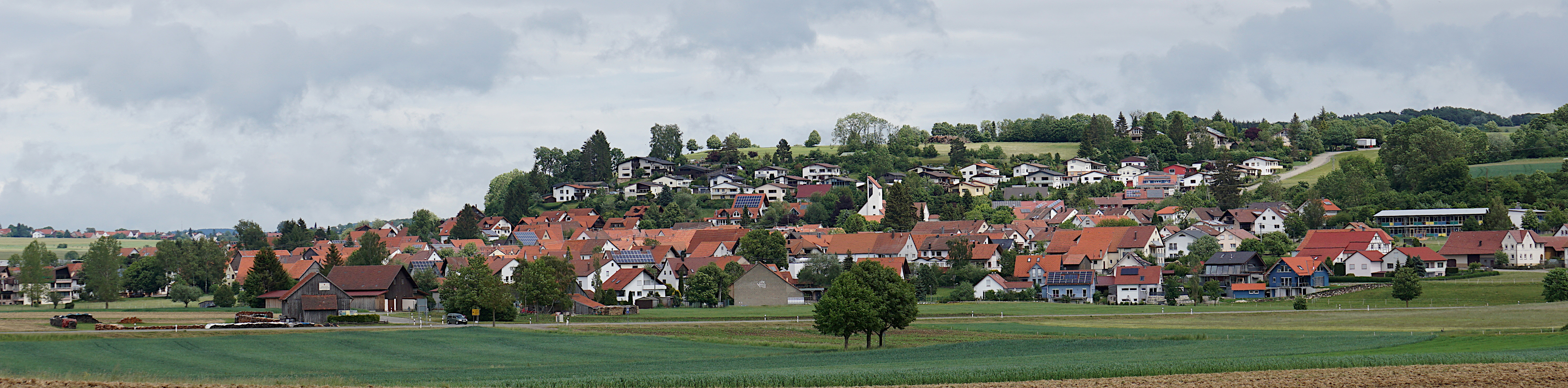 Lonsingen vom Westen aus.